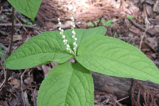 フタリシズカ （神奈川県丹沢山地）Chloranthus serratus (Tanzawa, Kanagawa, JAPAN)